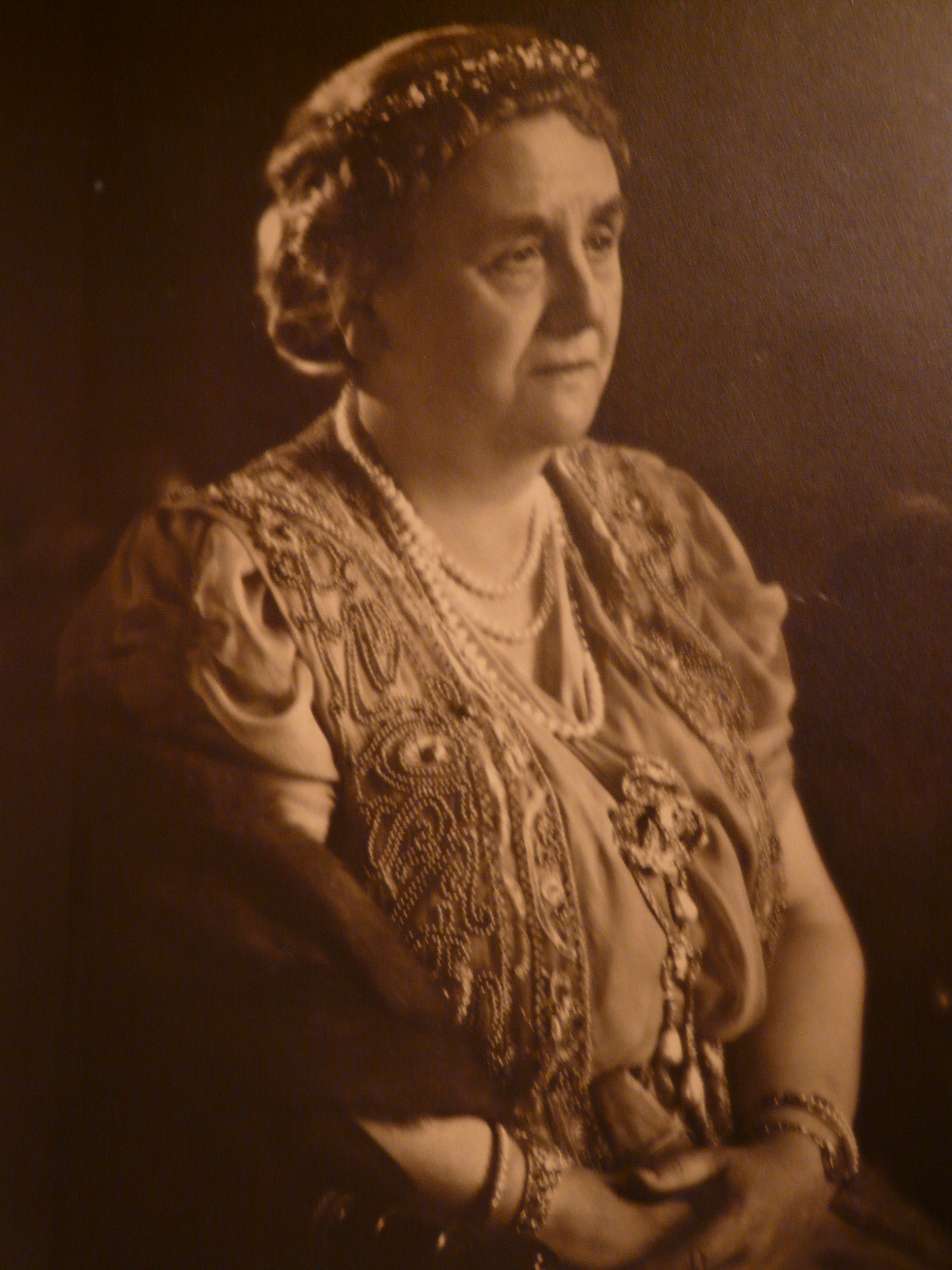 Wilhelmina der Nederlanden Staatsieportret Studio J. Merkelbach